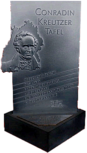 Conradin-Kreutzer-Tafel, Auszeichnung des Landes Baden-Württemberg für 150jährige kulturelle Verdienste um die Laienmusik